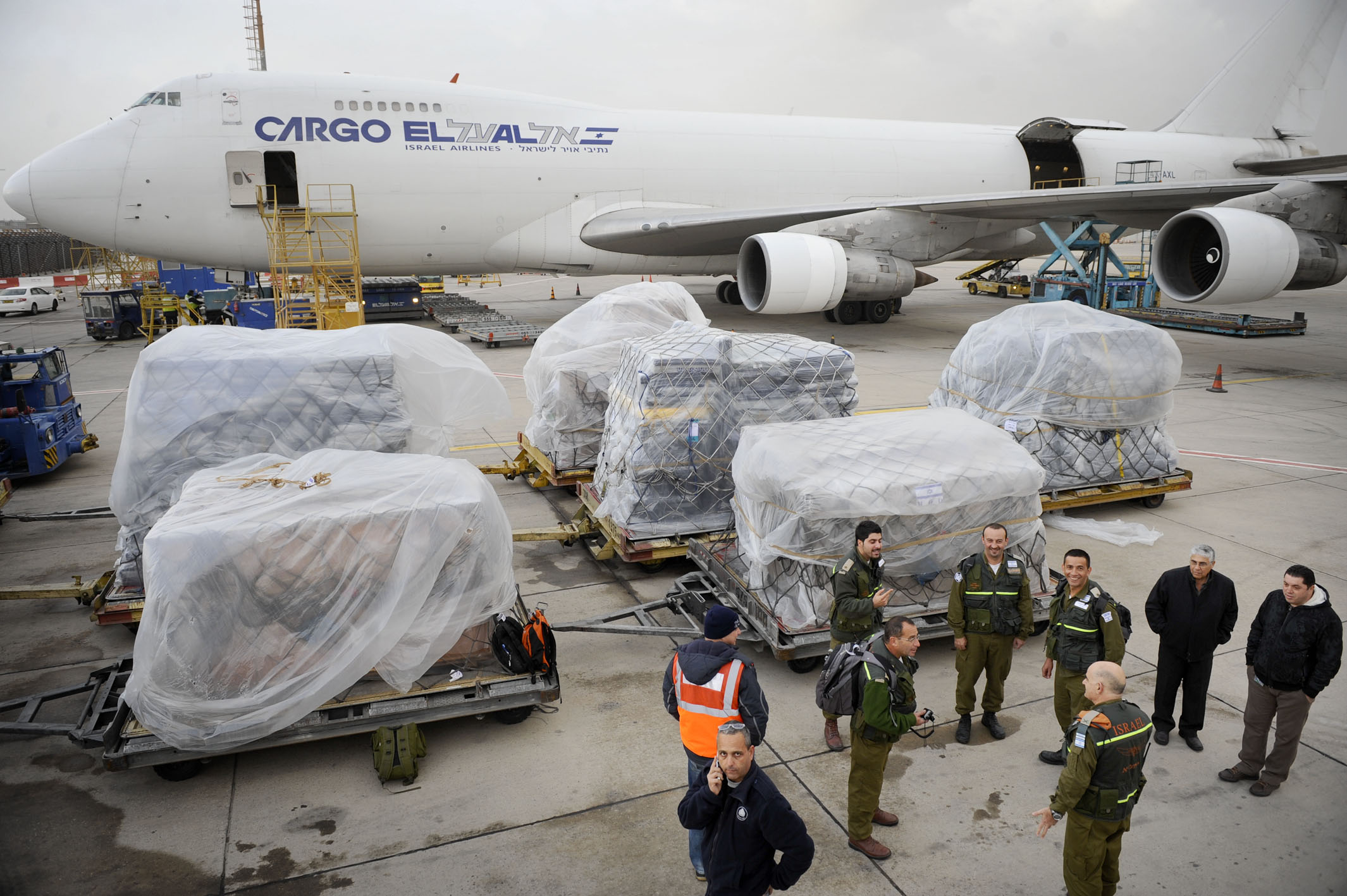 December 12, 2010. The Israeli aid delegation, compromised of personnel from the IDF and the Ministry of Defense, departs for Colombia. The aid delegation consists of approximately 50 tons of equipment, including 20 tons of dry foodstuffs, 2,000 blankets, 1,000 coats, 1,000 mattresses, 100 tents and 5,000 medical kits. Commander of Home Front Command’s National Search and Rescue Unit, Brig. Gen. (Res.) Shalom Ben-Arye, said: “The IDF instructed the Home Front Command to send a humanitarian aid delegation to the Colombian flood victims. We are to land in Colombia, distribute the aid and return only once our mission is completed.” Deputy General Manager of the Ministry of Defense, Mr. Bezalel Treiber, said: “Over the past two days there has been a rapid deployment, including approximately 50 tons of equipment. The delegation will now set out for Colombia. I wish to thank the delegation staff, the Home Front Command and the Ministry of Defense and wish them luck on their mission.” For more details, see the IDF blog. היום (א') יצאה משלחת סיוע מטעם צה"ל ומשרד הביטחון לקולומביה, בכדי לסייע לנפגעי האסון באזור. משלחת הסיוע כוללת כחמישים טון ציוד, מתוכם עשרים טון מזון יבש, אלפיים שמיכות, אלף שכמיות, אלף מזרונים, מאה אוהלים וחמשת אלפים ערכות רפואיות. מפקד יחידת החילוץ הארצית של פיקוד העורף, תת אלוף שלום בן אריה: "פיקוד העורף הונחה ע"י צה"ל להוציא משלחת סיוע הומניטארי לאסון בקולומביה. אנחנו נוחתים בקולומביה, מעבירים את הציוד וחוזרים רק לאחר שווידאנו שהמשימה הושלמה." סמנכ"ל משרד הביטחון, בצלאל טרייבר: " אחרי היערכות זריזה שנעשתה ביומיים האחרונים עם ציוד נרחב בהיקף של כחמישים טון, תצא המשלחת לקולומביה. אני מאחל הצלחה ותודה לצוות, לפיקוד העורף ולמשרד הביטחון."